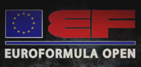 Screenshot del logo Euroformula Open tratto da video rilasciato con licenza CC 3.0